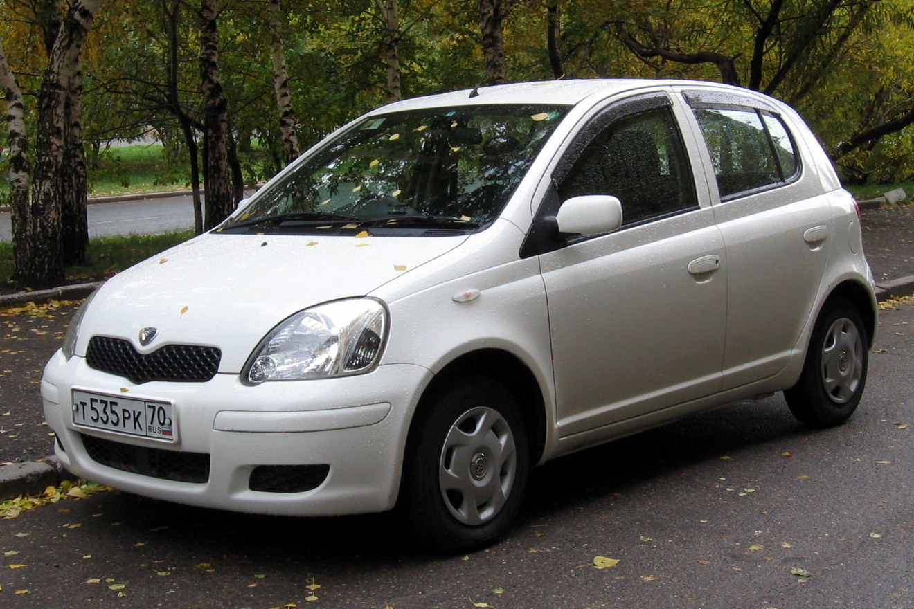 Photo taken in Tomsk, Russia